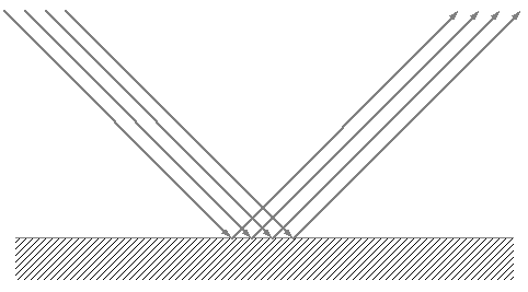 Schéma réflexion spéculaire Auteur : Fabien2005 Catégorie:Schéma_de_physique